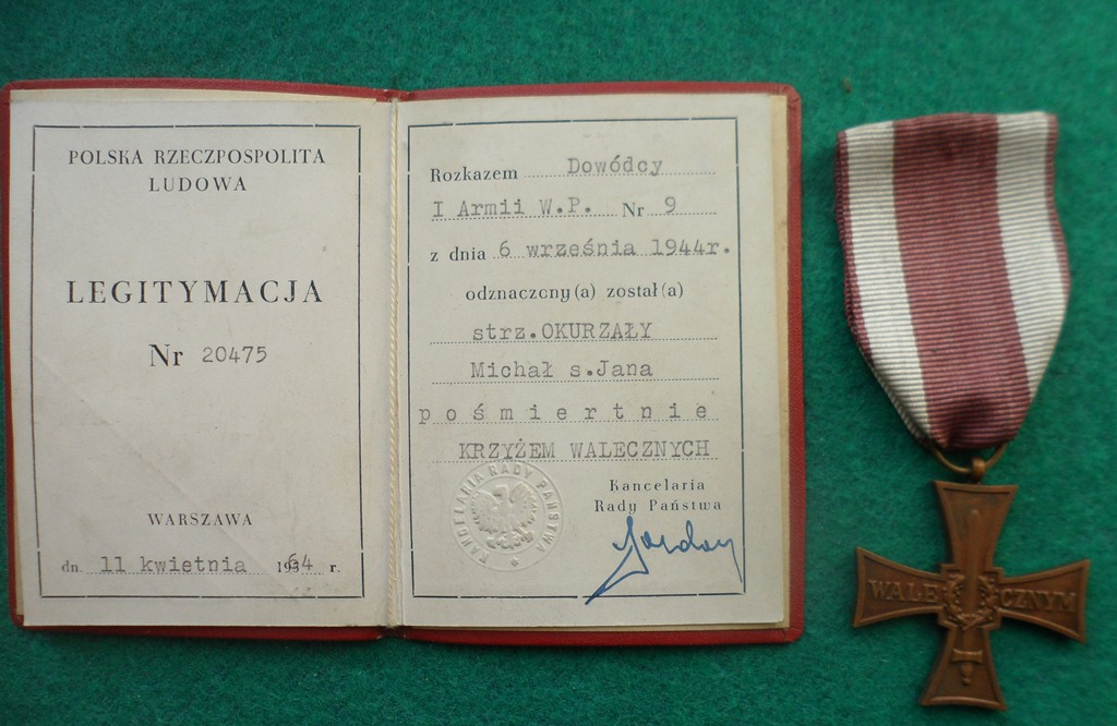 Odbitka zdjęcia w sali tradycji JW 5699. Odznaczenie pośmiertne Krzyżem Walecznych dla Michała Okurzałego